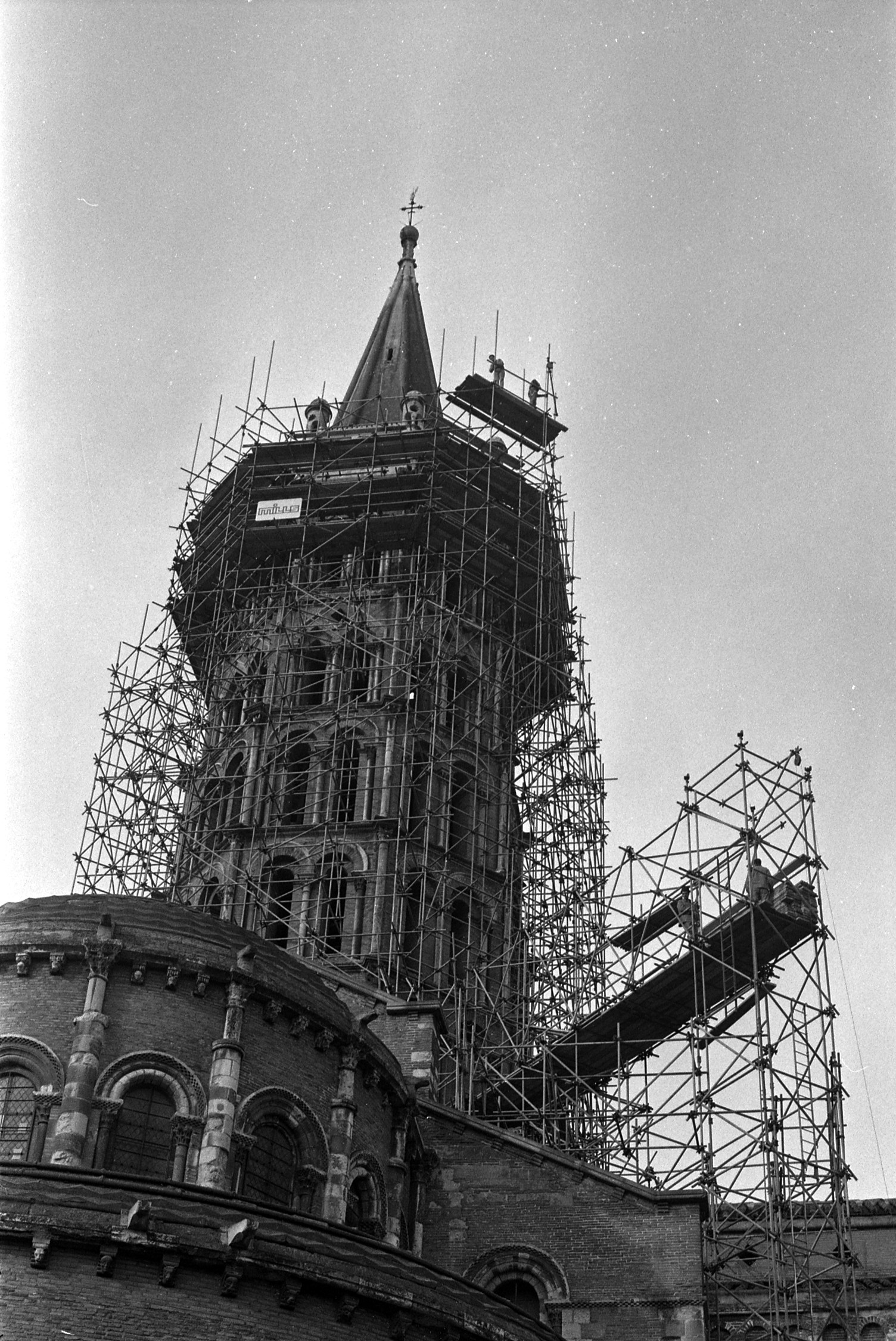 Basilique de Saint-Sernin. Le 3 avril 1969. Vue du clocher de la basilique de Saint-Sernin en rénovation.